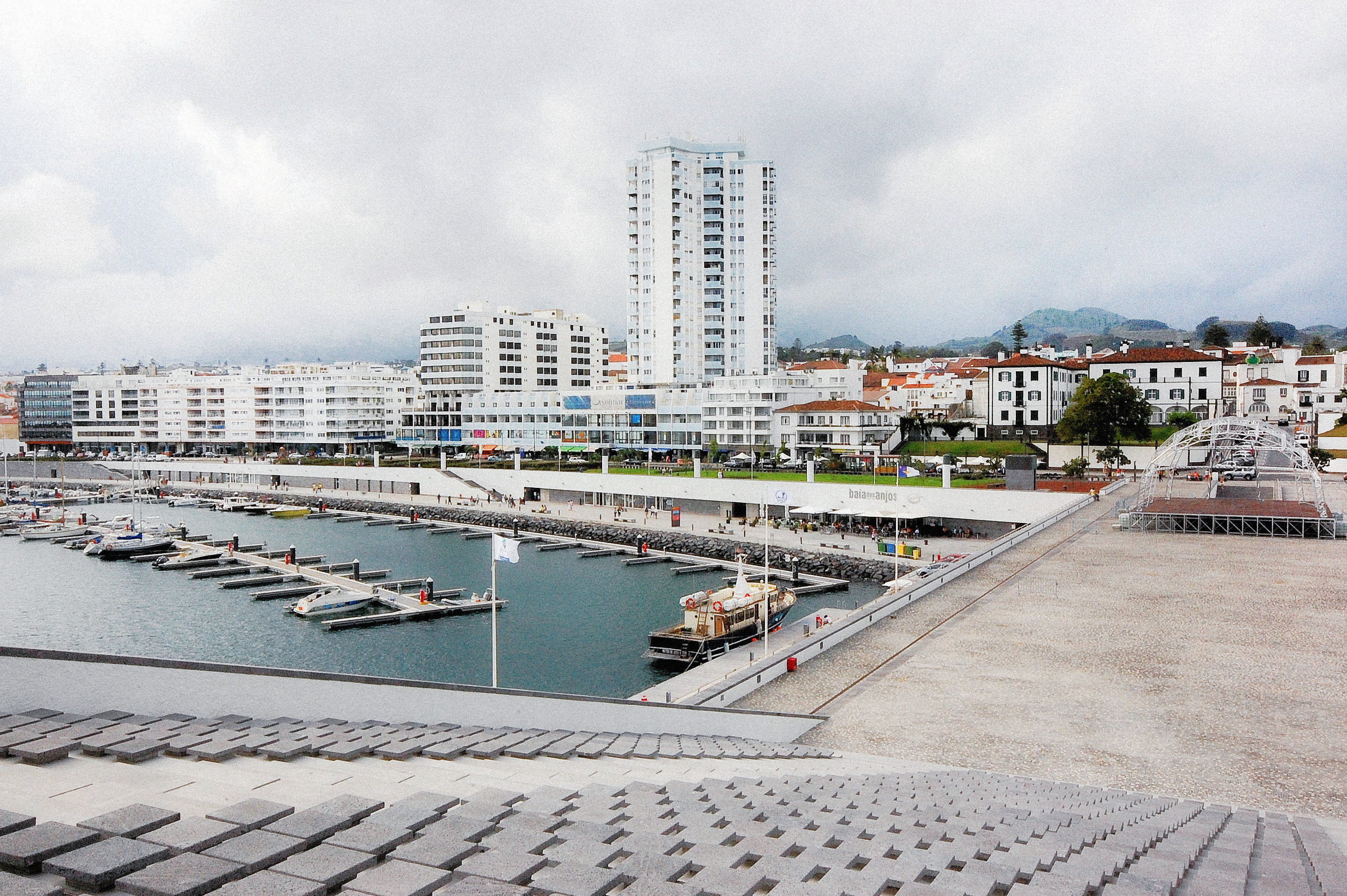 Ponta Delgada, Azores, Portugal.